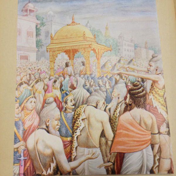 Chitra Ramayana (Illustrated Ramayana) is a simplified story of the great Indian epic in Kannada. The type is bold and beautiful. The thick pages have become brittle and need careful handling. Printed by B. Miller, Superintendent, British India, Press, Mazgaon, Bombay. It was published by, Shrimat Balasaheb Pandit Pant Pratinidhi, chief of Aundh, at Aundh, Satara district. The Kannada version is by Ramachandra Madhwa Mahishi The date shown is 1916. It is all the more important because the book contains illustrations painted by the publisher also called Bhavan Rao Shrinivas Rao, the ruler of the state of Aundh himself.